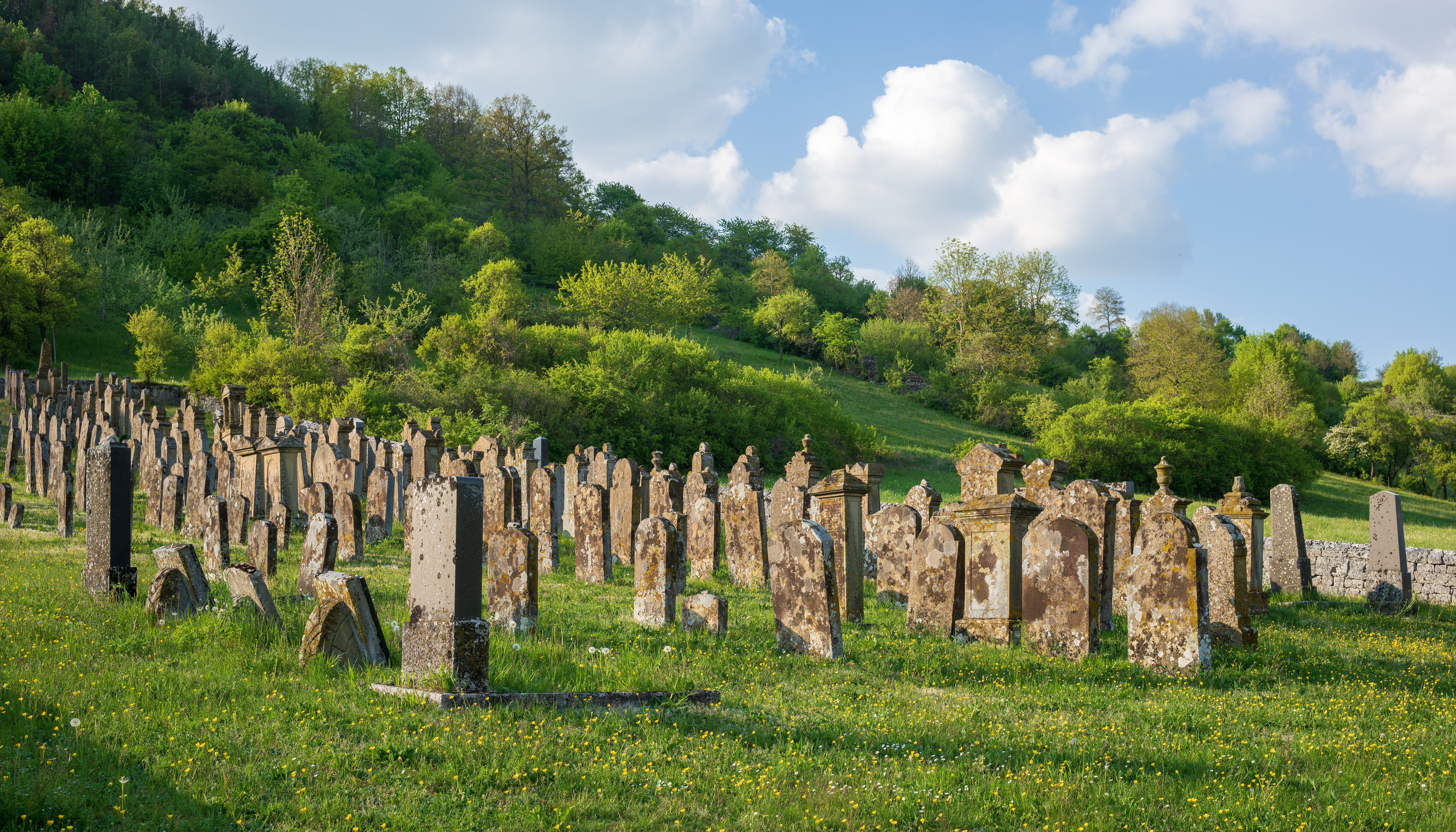 Dörzbach (Hohenlohekreis): Der jüdische Friedhof beim Teilort Hohebach, Ansicht von Süden mit Abendsonne.